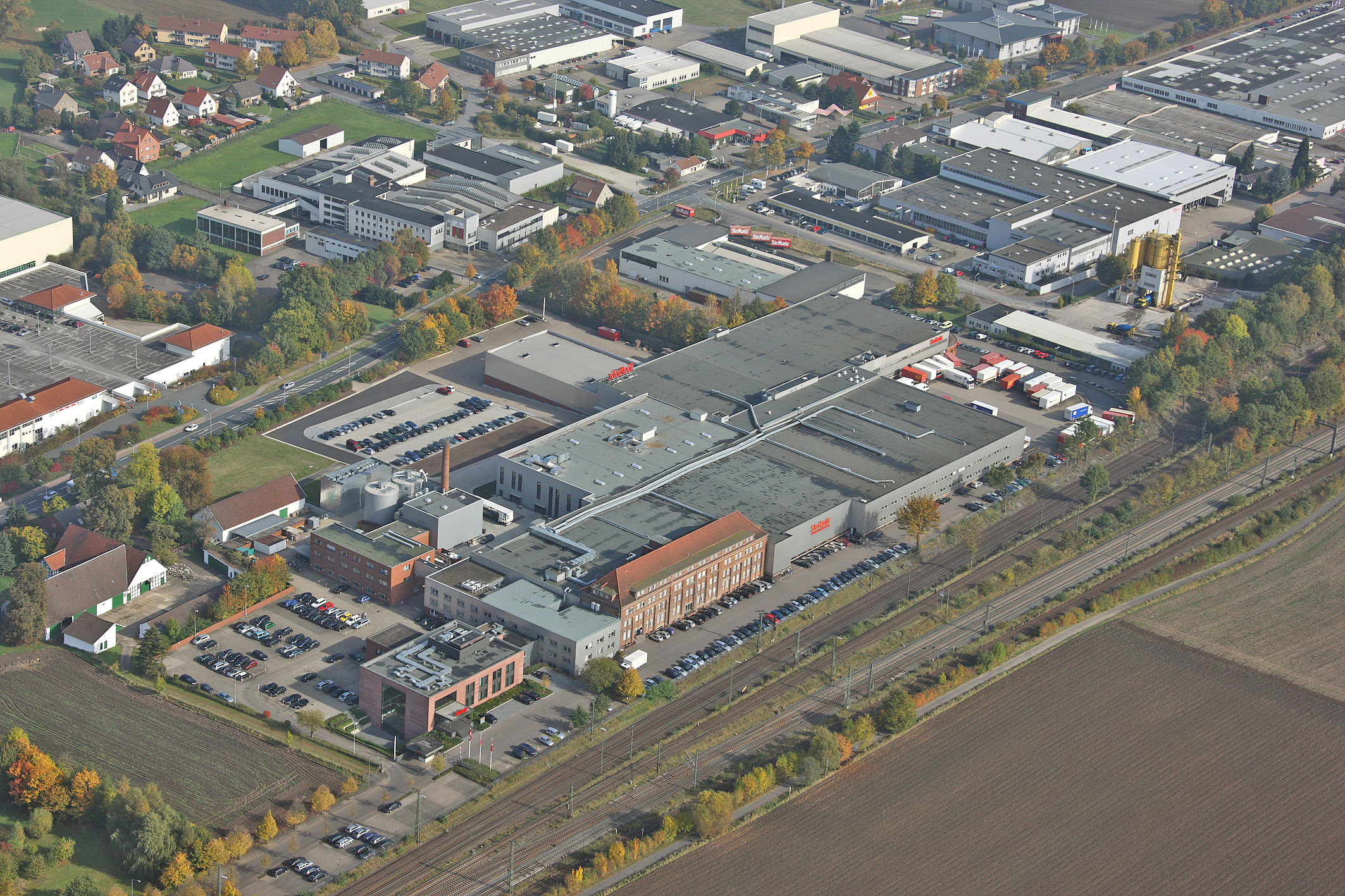 Luftbild des Firmengeländes von SieMatic in Löhne, Nordrhein-Westfalen